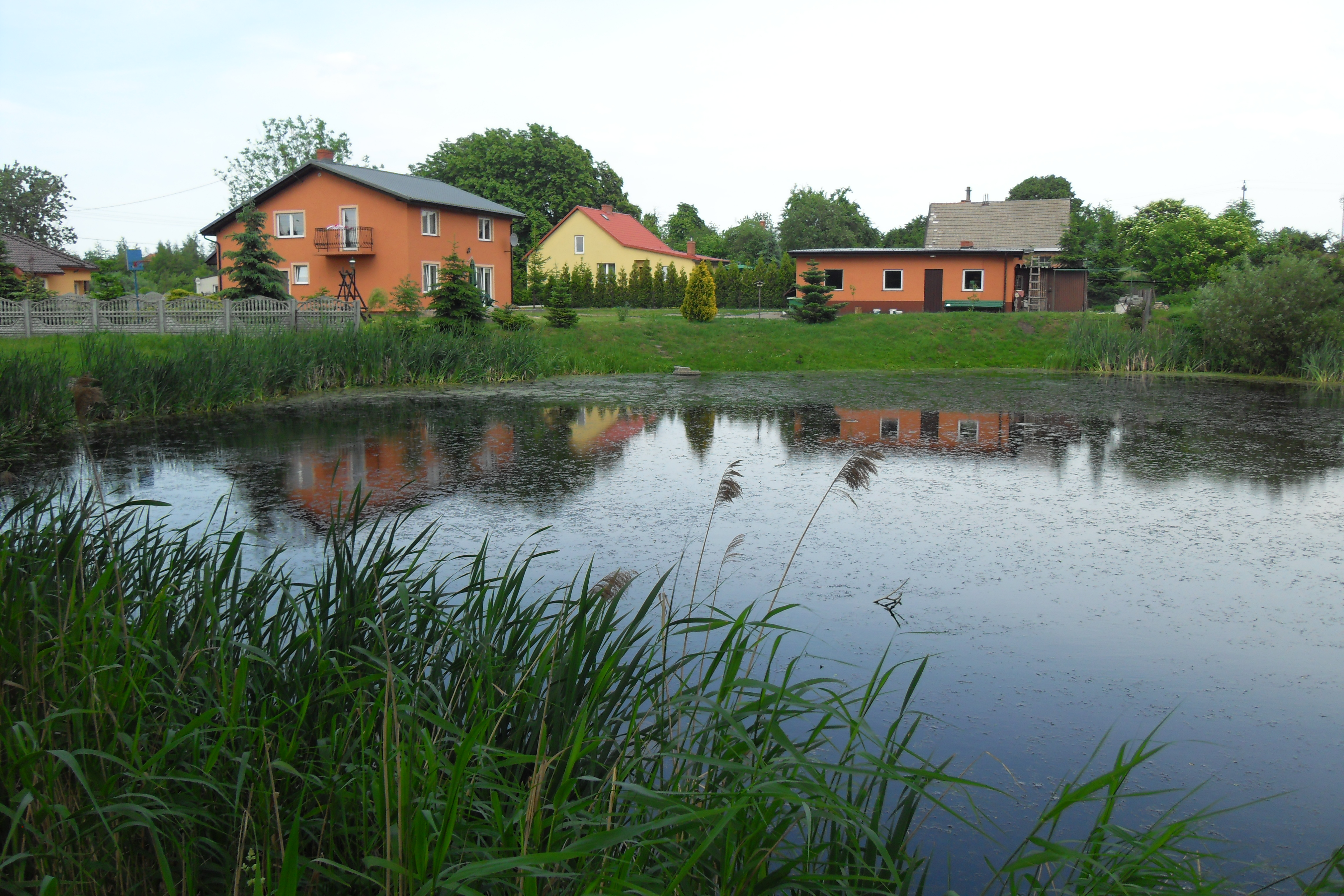 Gdańsk Maćkowy (dzielnica Chełm).